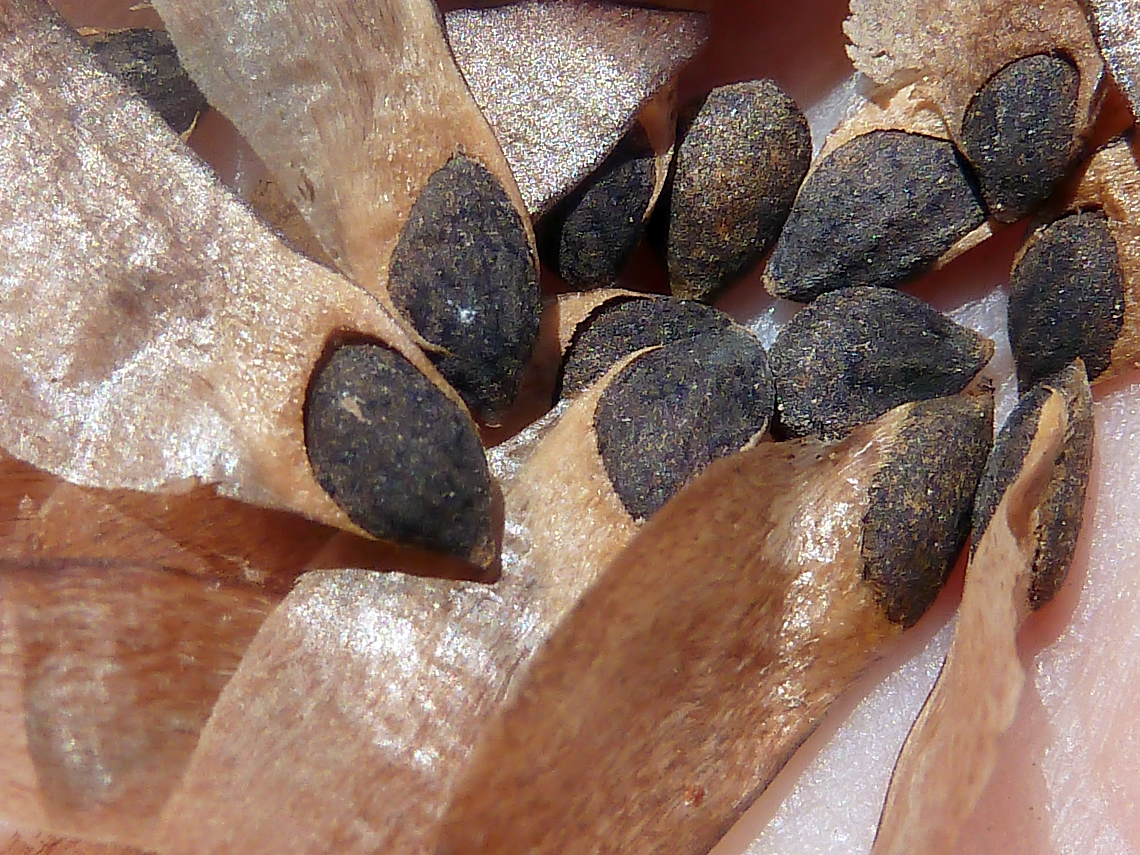 Pinus halepensis (pino carrasco) - Semillas aladas (las alas son las brácteas ovulíferas / seminíferas del estróbilo). - Parque de La Huerta, Albatera, Provincia de Alicante (España).